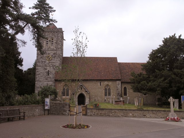 St. Peter & St. Paul church